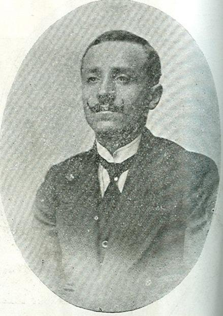 Владимир Сланков (1889 - 1914).